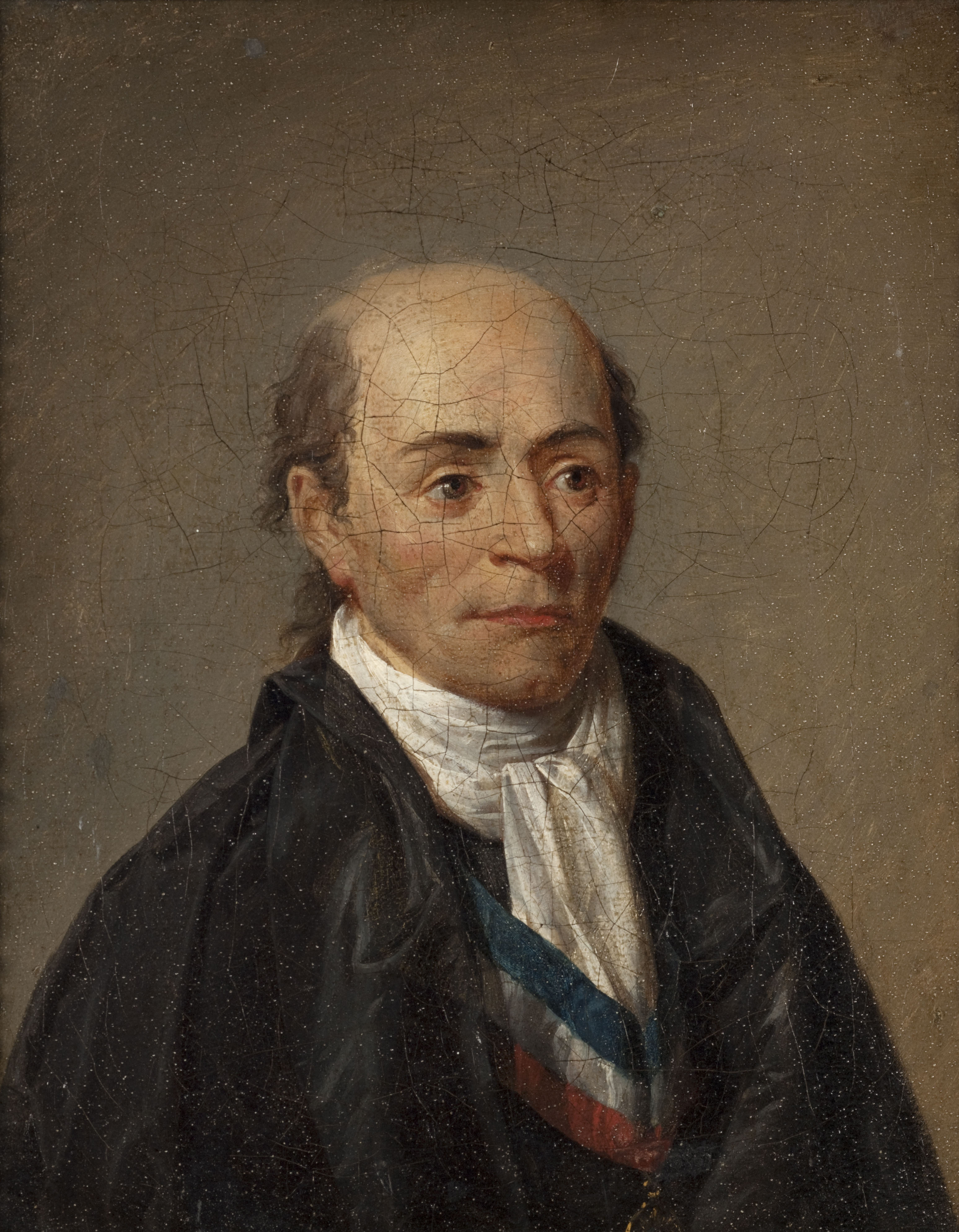 Portrait peint de Joseph Chalier ceint d'une écharpe tricolore. Toile attribuée à Jean-François Garneray, Paris, musée Carnavalet, vers 1793.